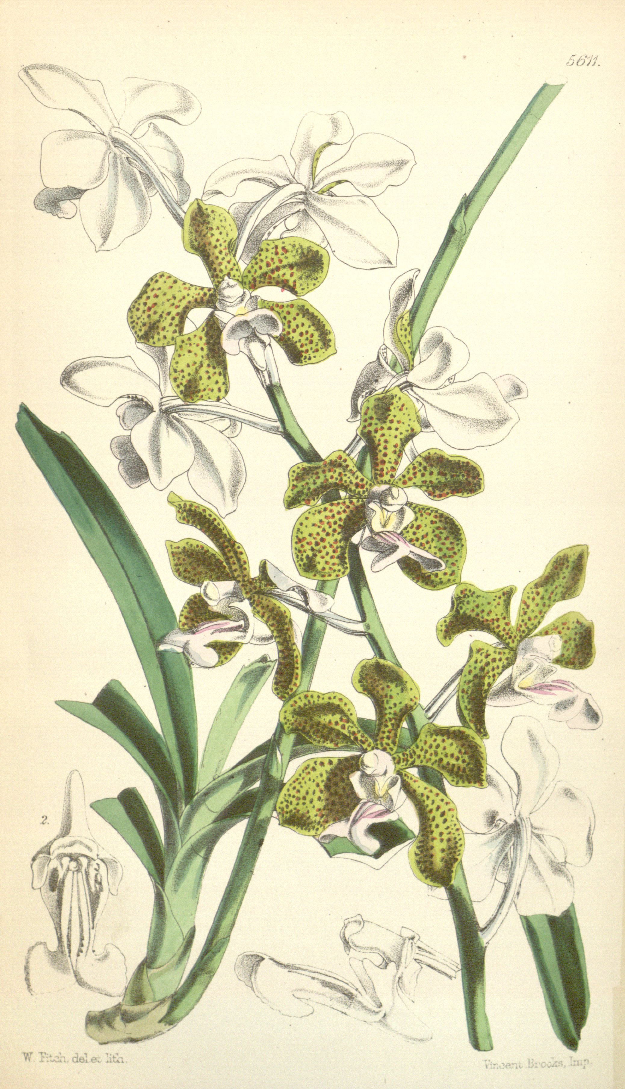 Illustration of Vanda bensonii (Orig. Vanda bensoni)